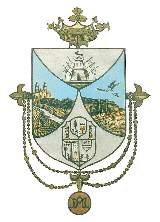 El presente es el ESCUDO de ARMAS identificatorio de la ciudad de Villa del Rosario, Departamento Río Segundo de la Provincia de Córdoba. Republica Argentina